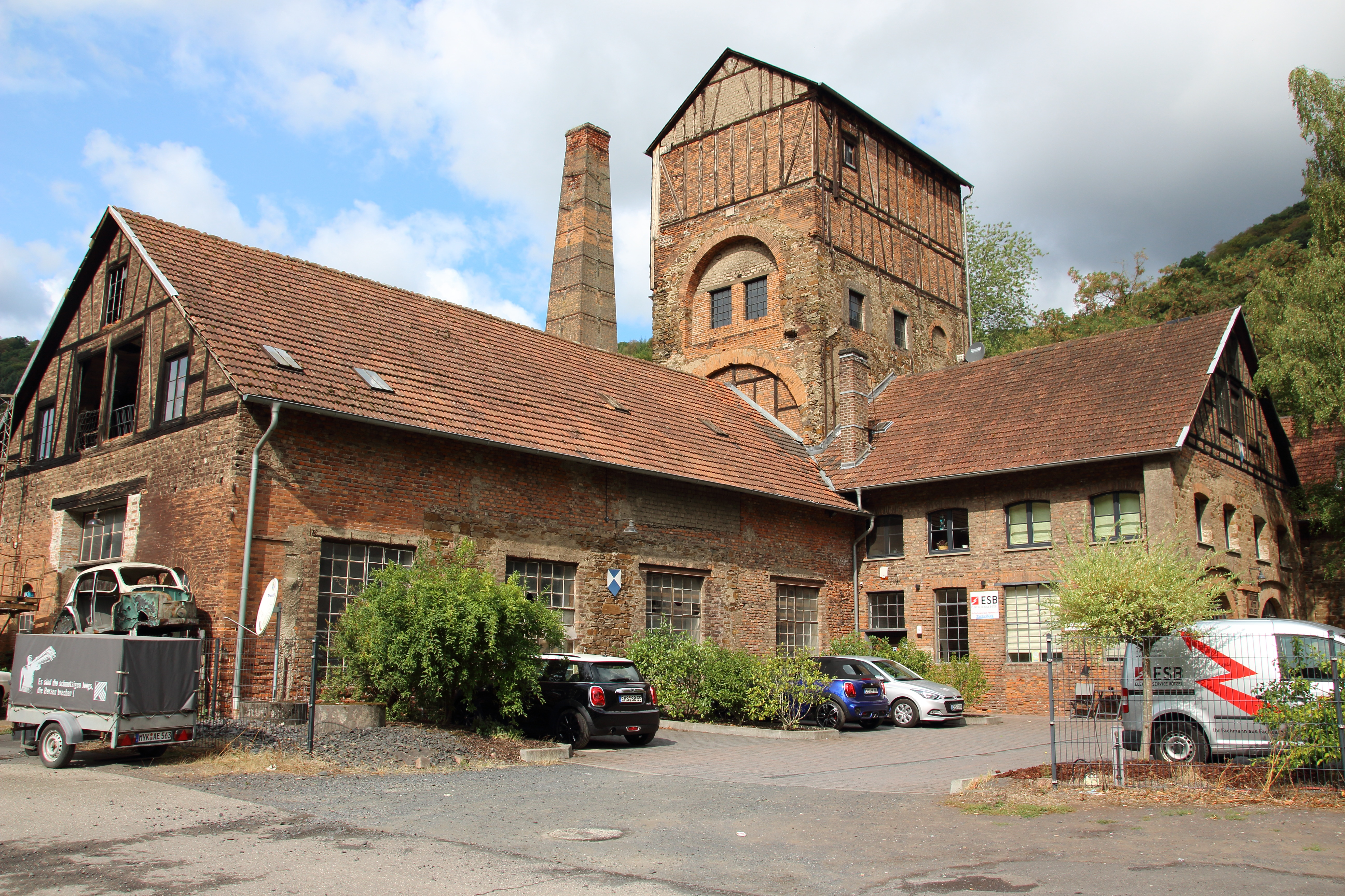 Nieverner Hütte. Ehemalige Eisenhütte auf der Insel Oberau, Fachbach, Rhein-Lahn-Kreis